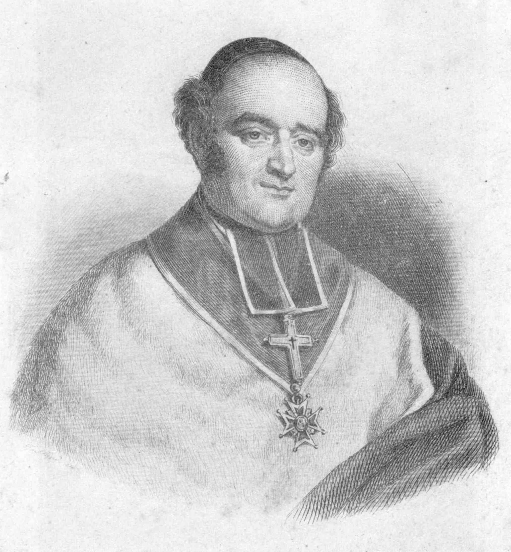 Gravure du Cardinal Jacques Marie Antoine Célestin du Pont.